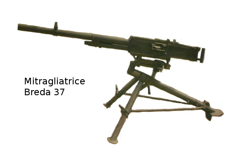 Una mitragliatrice pesante Breda mod. 37